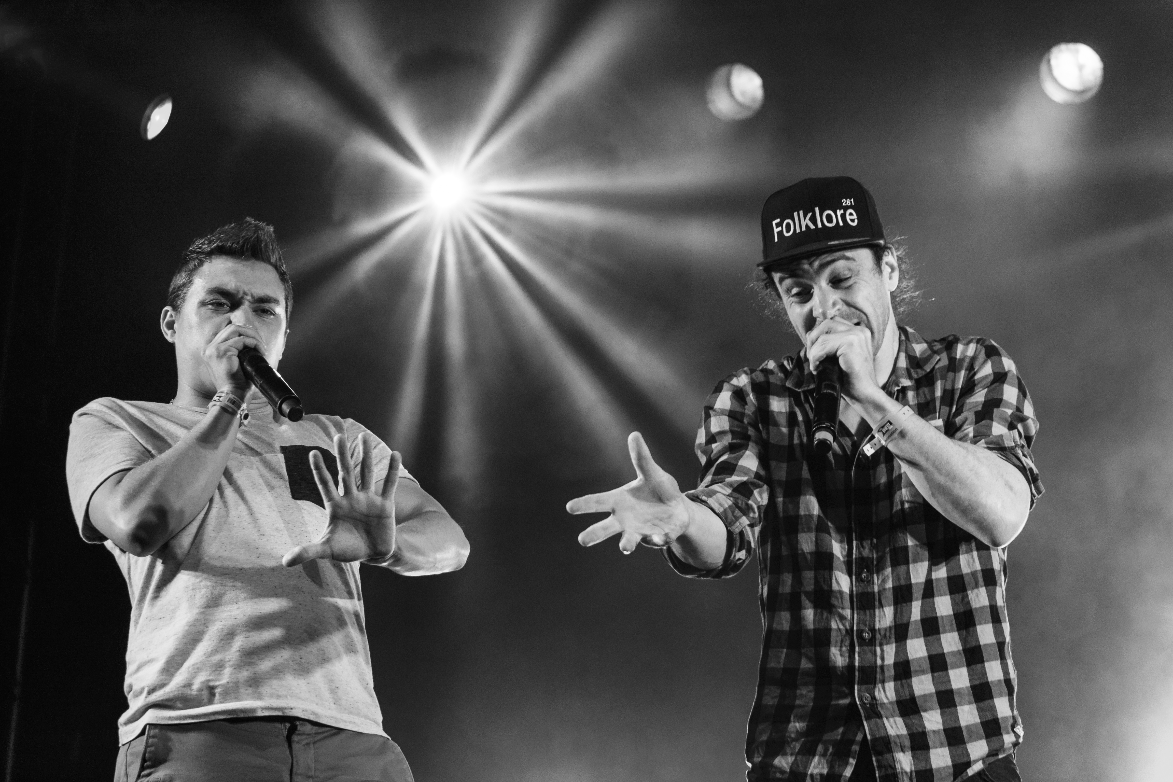 Krismenn & Alem en concert sur la grande scène des fêtes maritimes de Brest 2016.